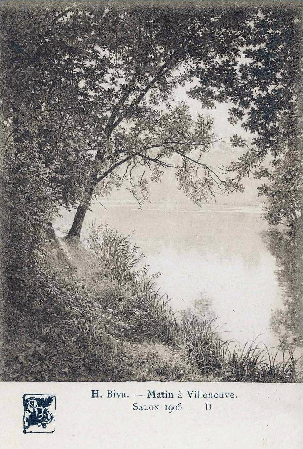 Henri Biva, Matin à Villeneuve, Salon 1906, Vintage postcard